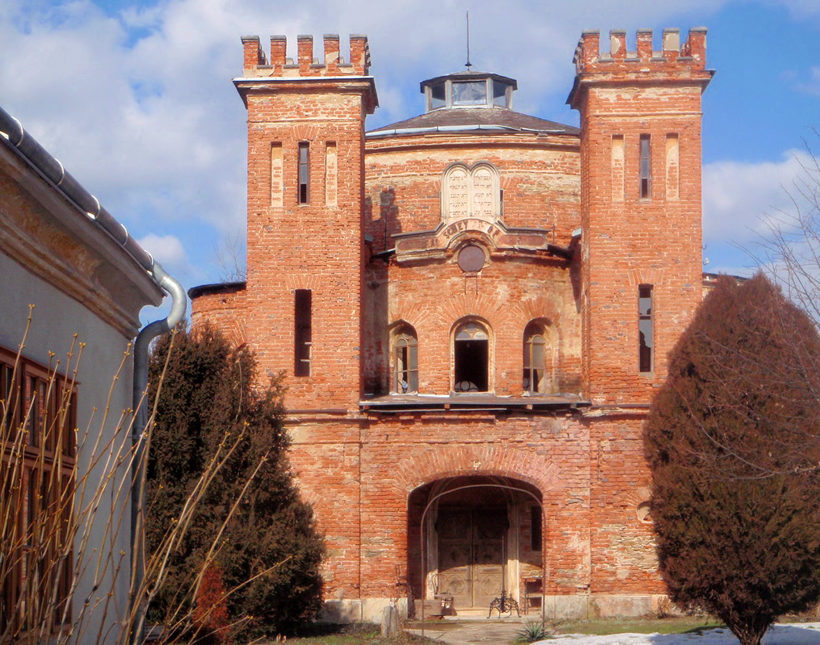 Güns, Synagoge